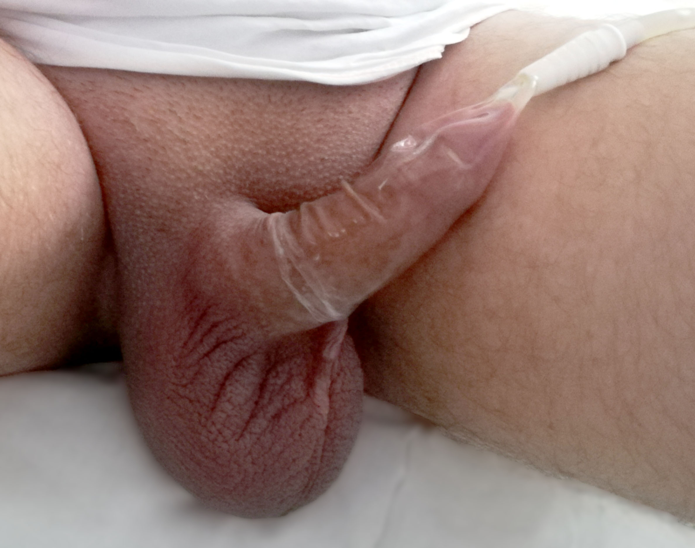 Cewnik zewnętrzny zastosowanie